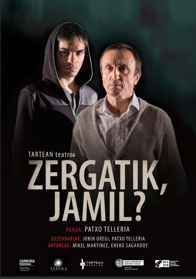 Patxo Telleriaren 'Zergatik, Jamil?' antzezlana, Mikel Martinez eta Eneko Sagardoy aktoreekin